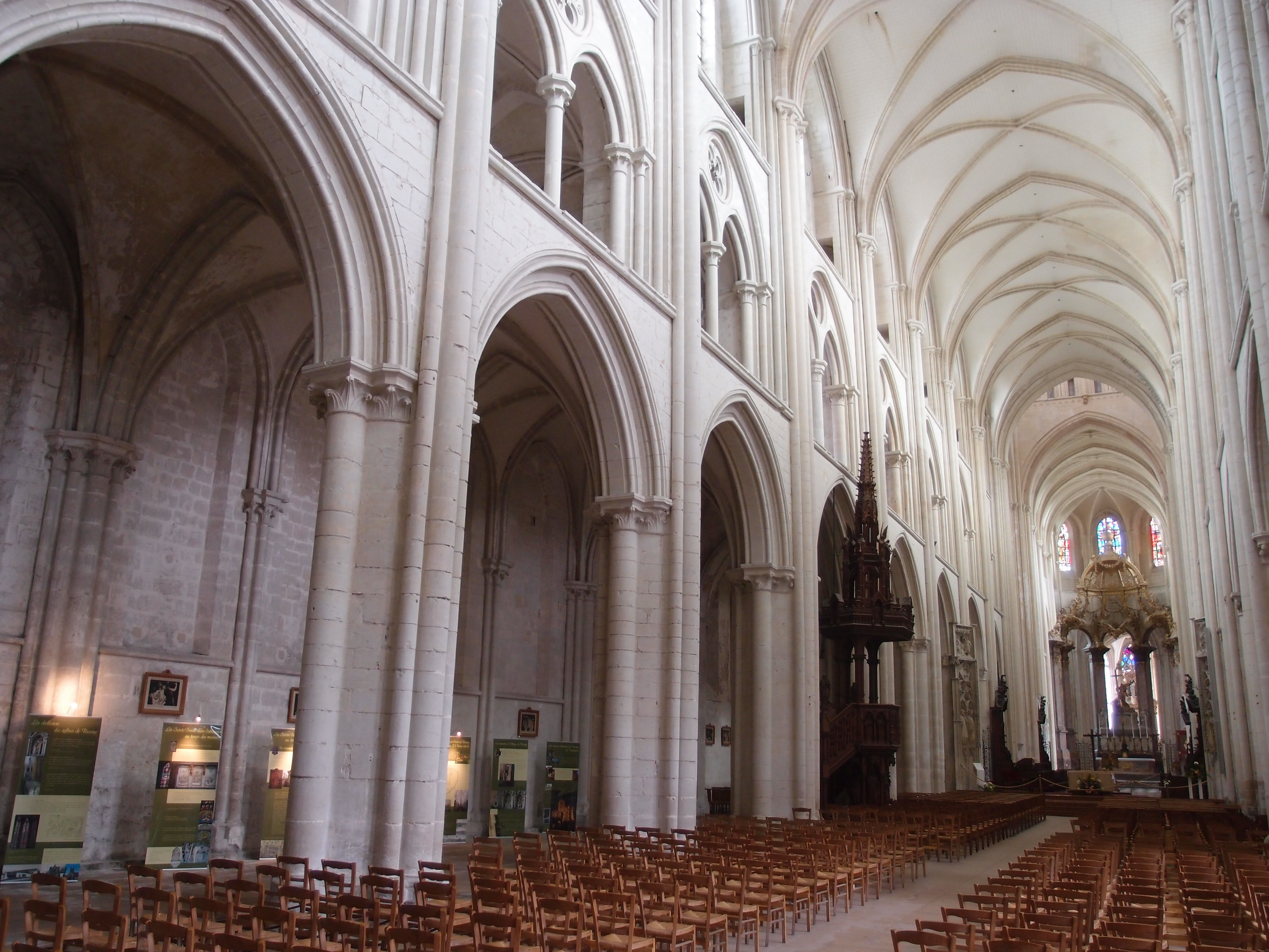 Fécamp: Abtei "La Trinité" - Innenansicht der Kirche Datum: 15.05.2012 Urheber: M. Pfeiffer alias Benutzer:Gordito1869 Quelle: privates Fotoarchiv des Urhebers